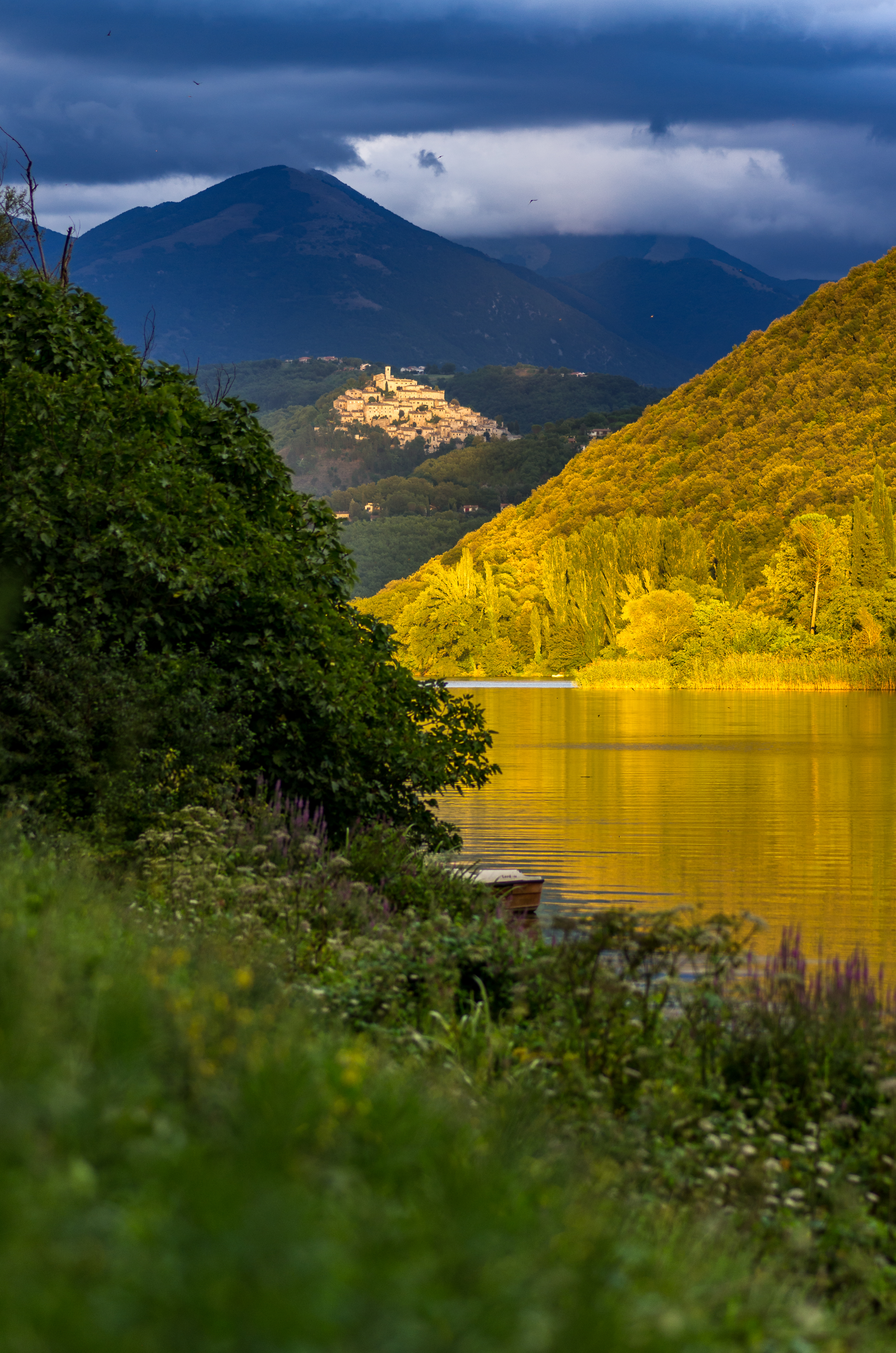 Lago di Piediluco (con sullo sfondo il castello di Labro).